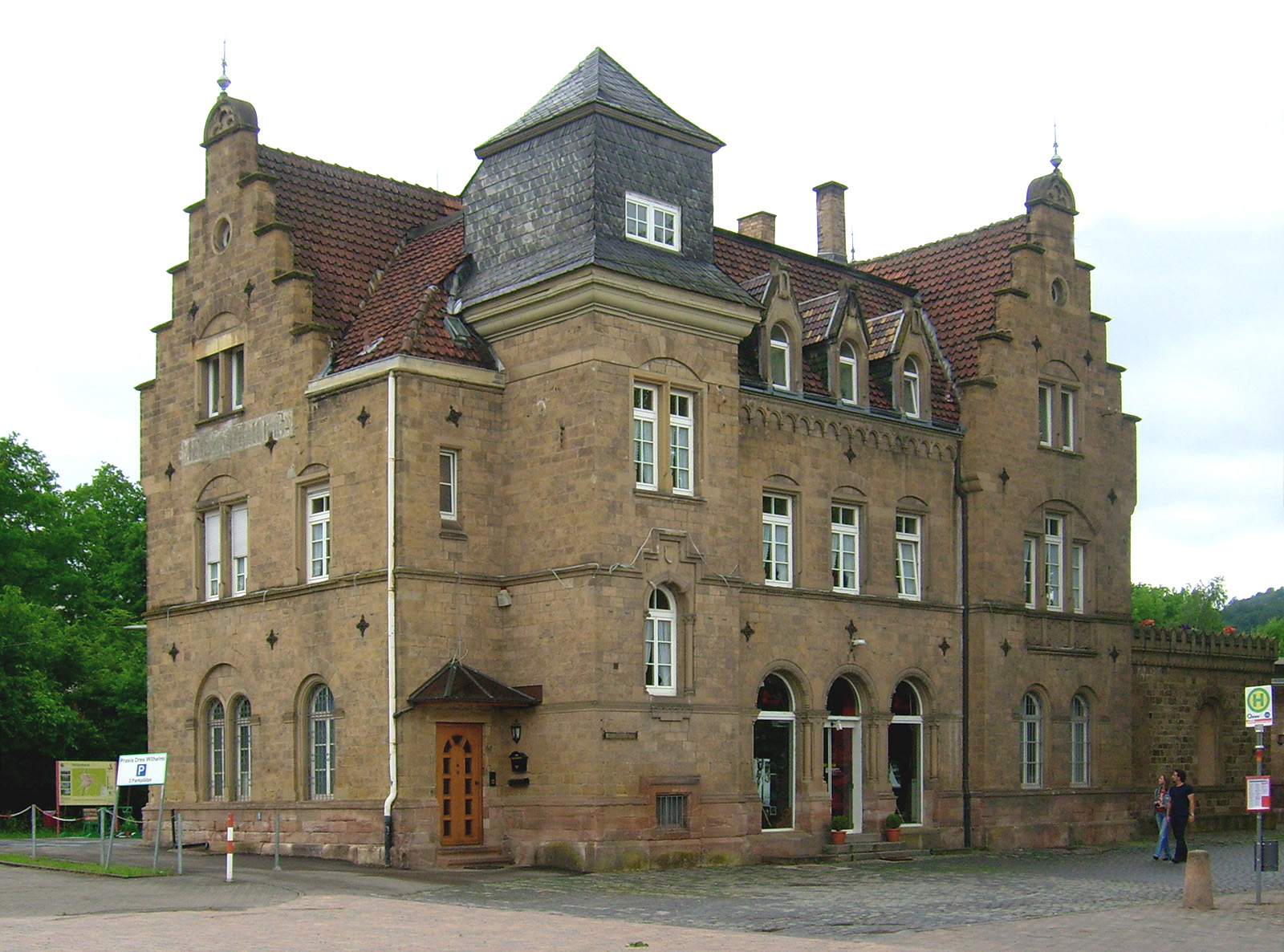 Bahnhof in Meisenheim